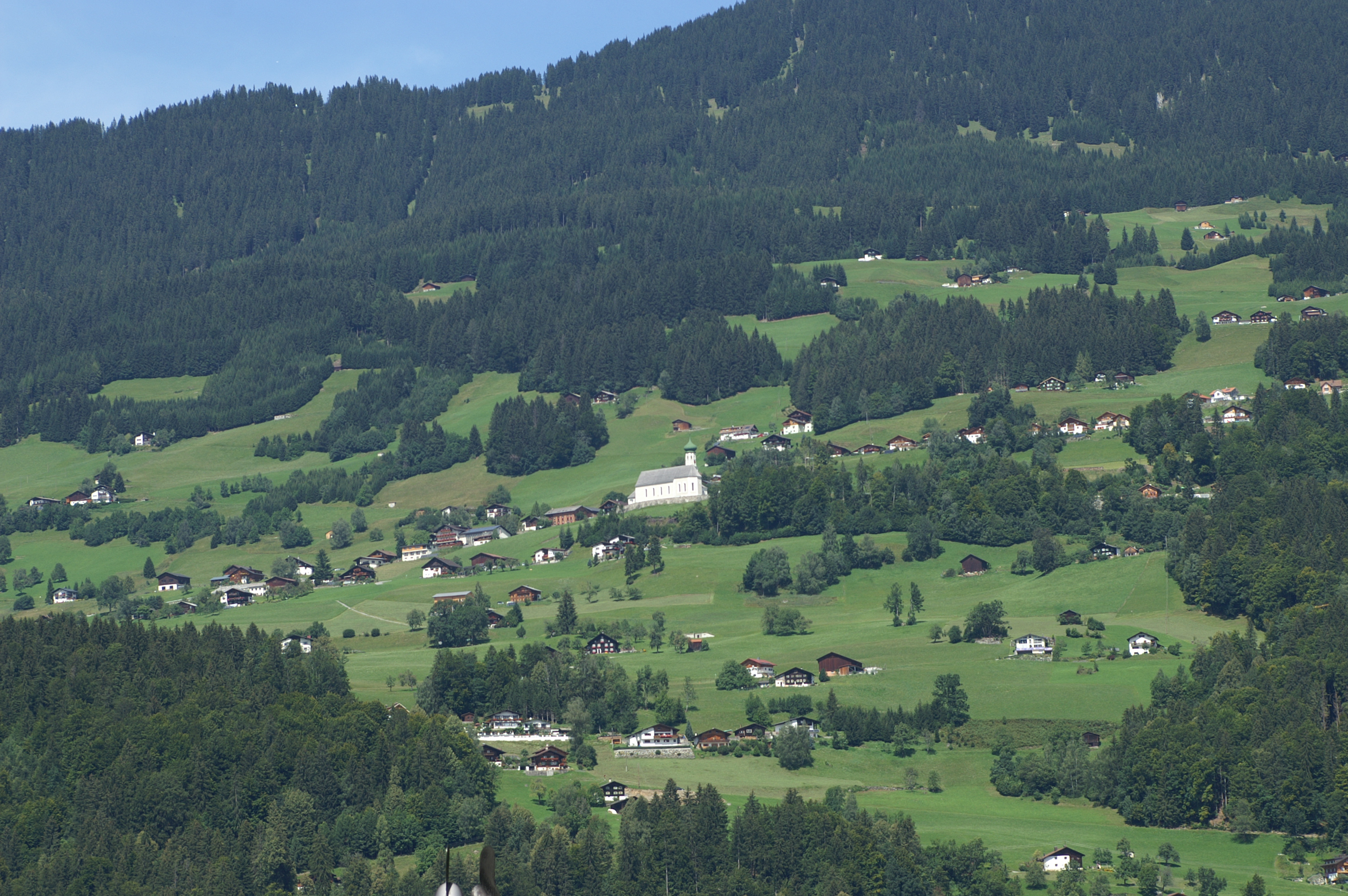 ein Ortsteil von Bartholomäberg in Vorarlberg